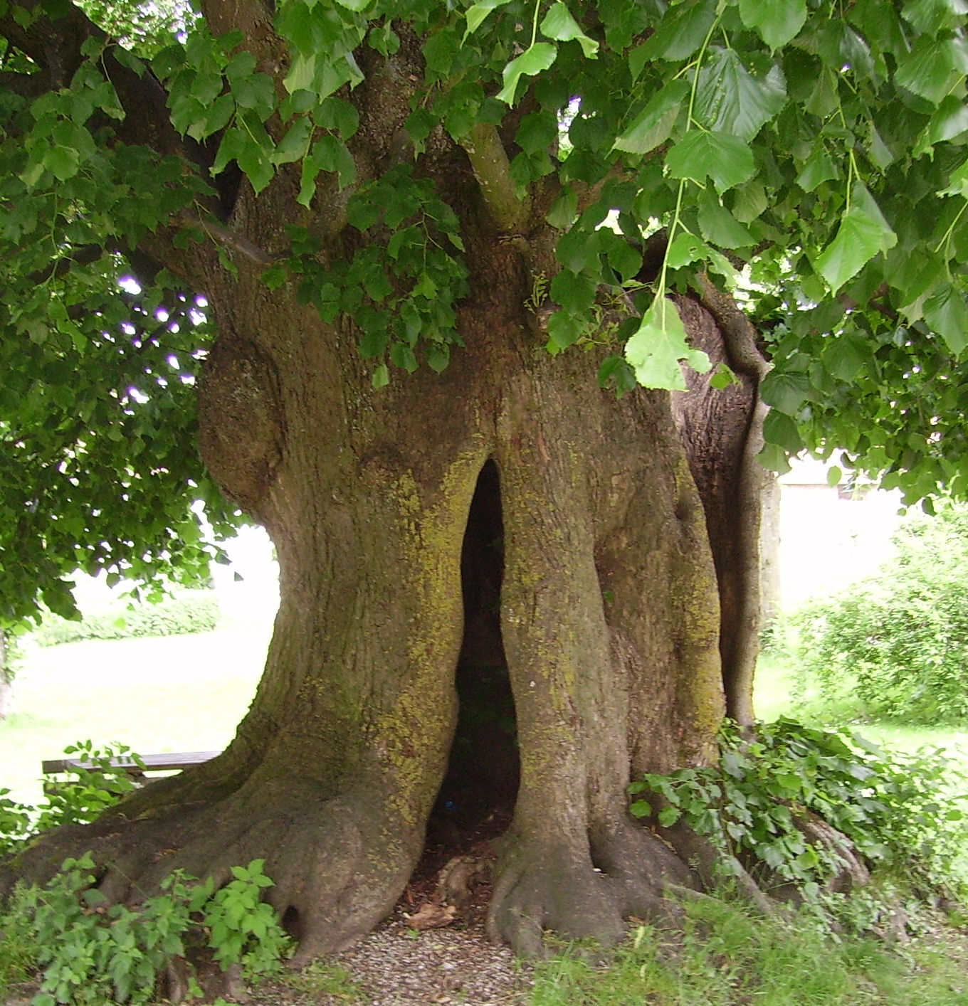 view of Herzogenreuth, part of Heiligenstadt in Oberfranken, Germany